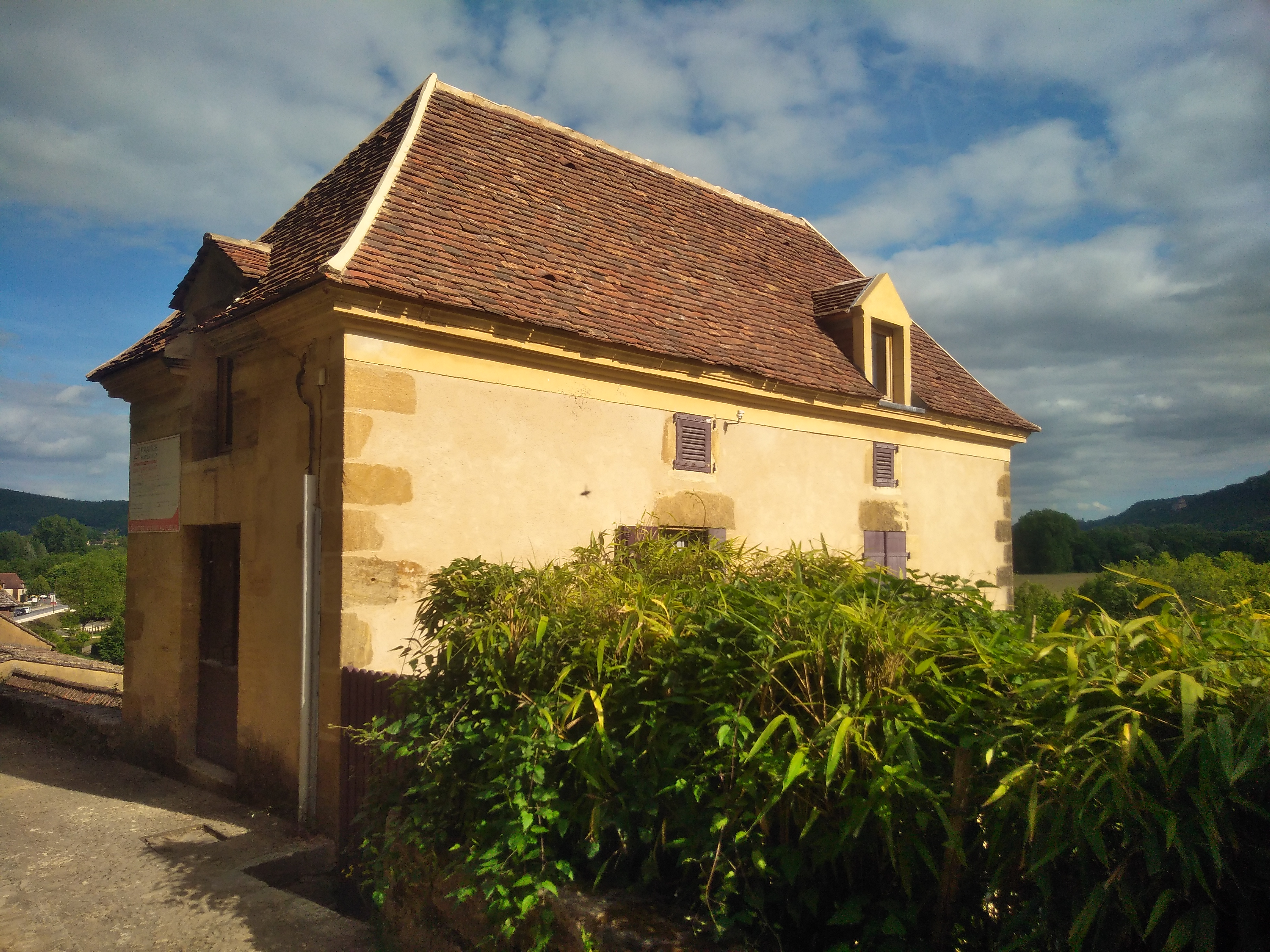 Beynac (Dordogne, France) - maison du dessinateur O'Galop